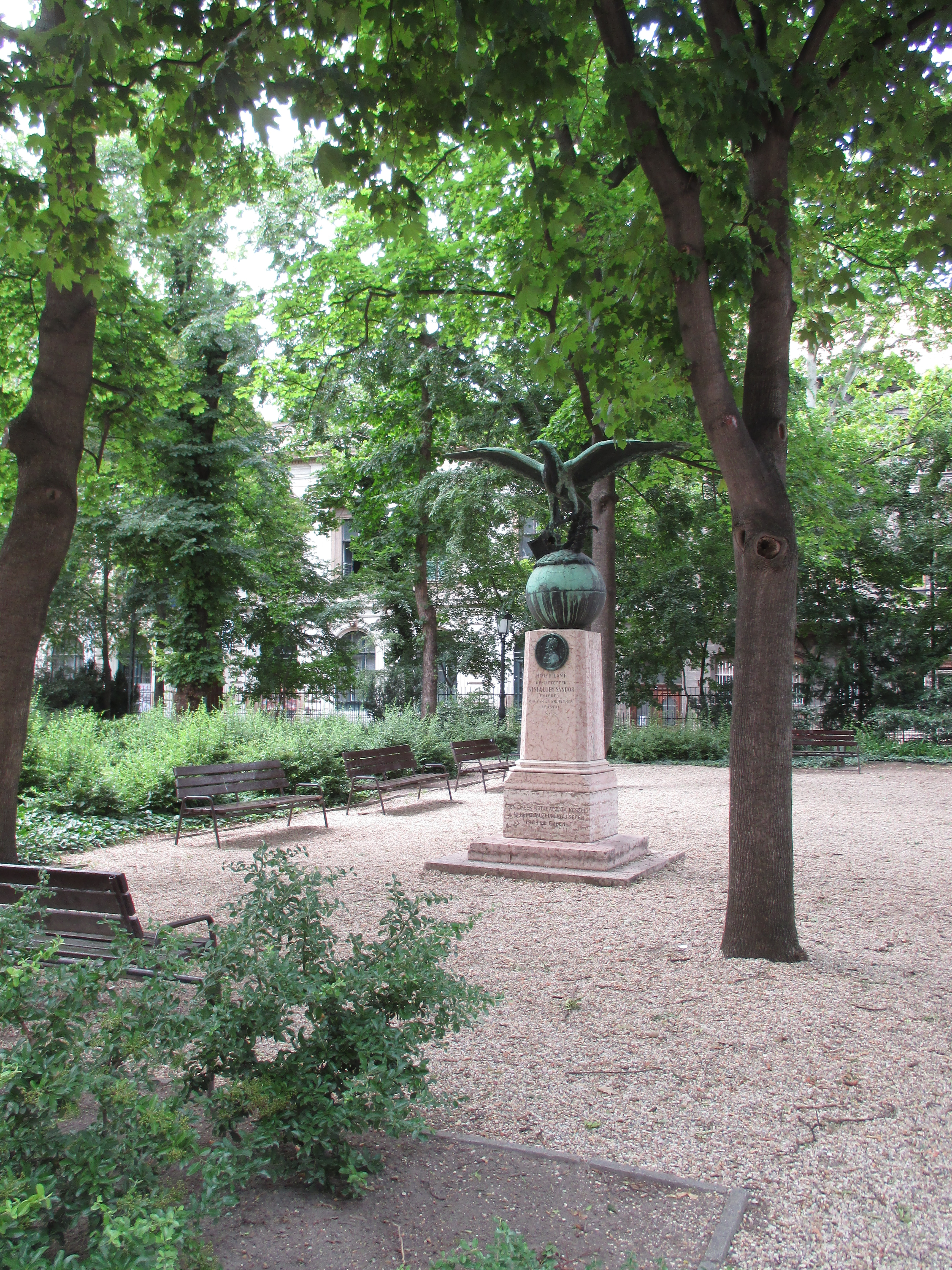 A "Himfy-lant" nevű szobor a Múzeumkertben, Budapest